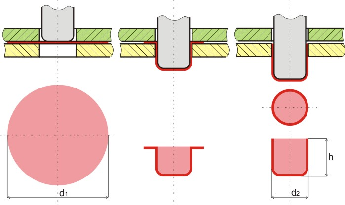 hlboke tahanie